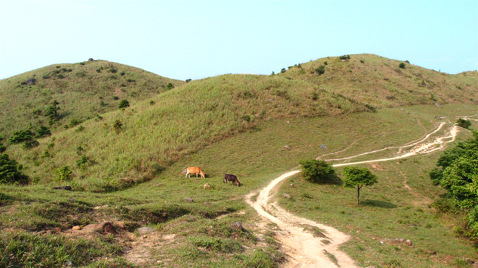 粵語: 四方山的草原，有牛群定居